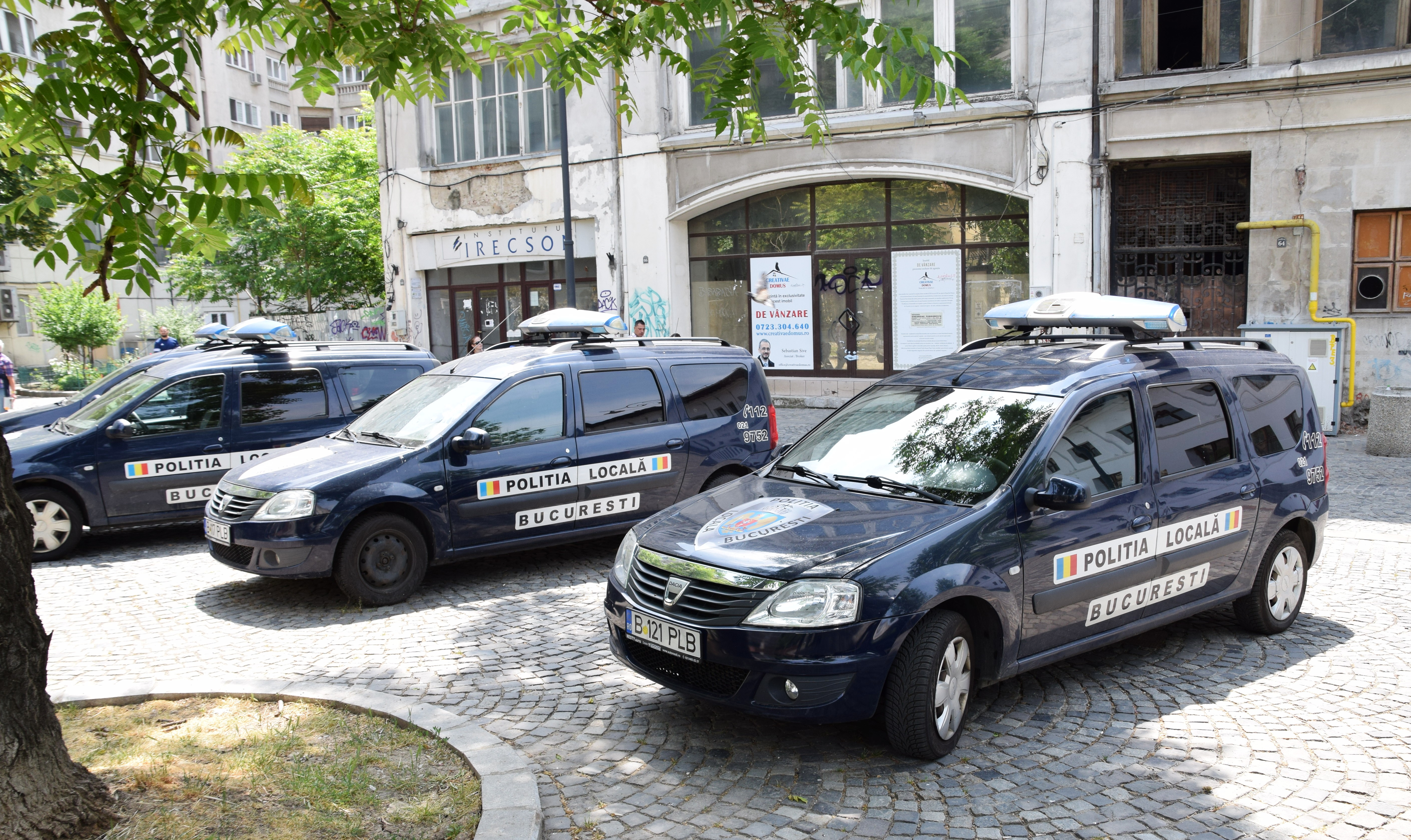 Lokale politie auto Boekarest